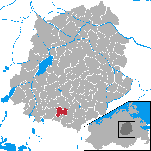 Briggow, Landkreis Demmin, Mecklenburg-Vorpommern